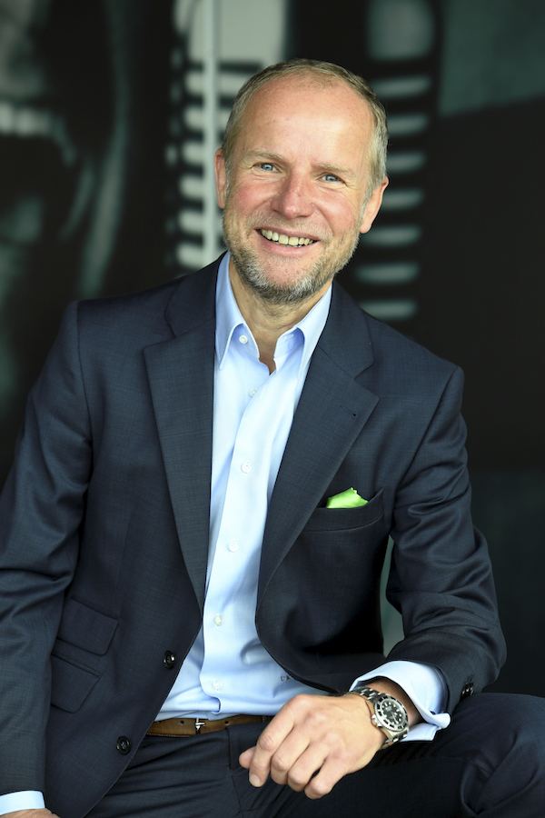 Ulrich R. J. Kubak, CEO Klassik Radio AG